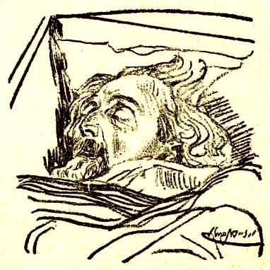 Русский и еврейский писатель Семён Акимович Ан-ский (1863-1920) на смертном одре